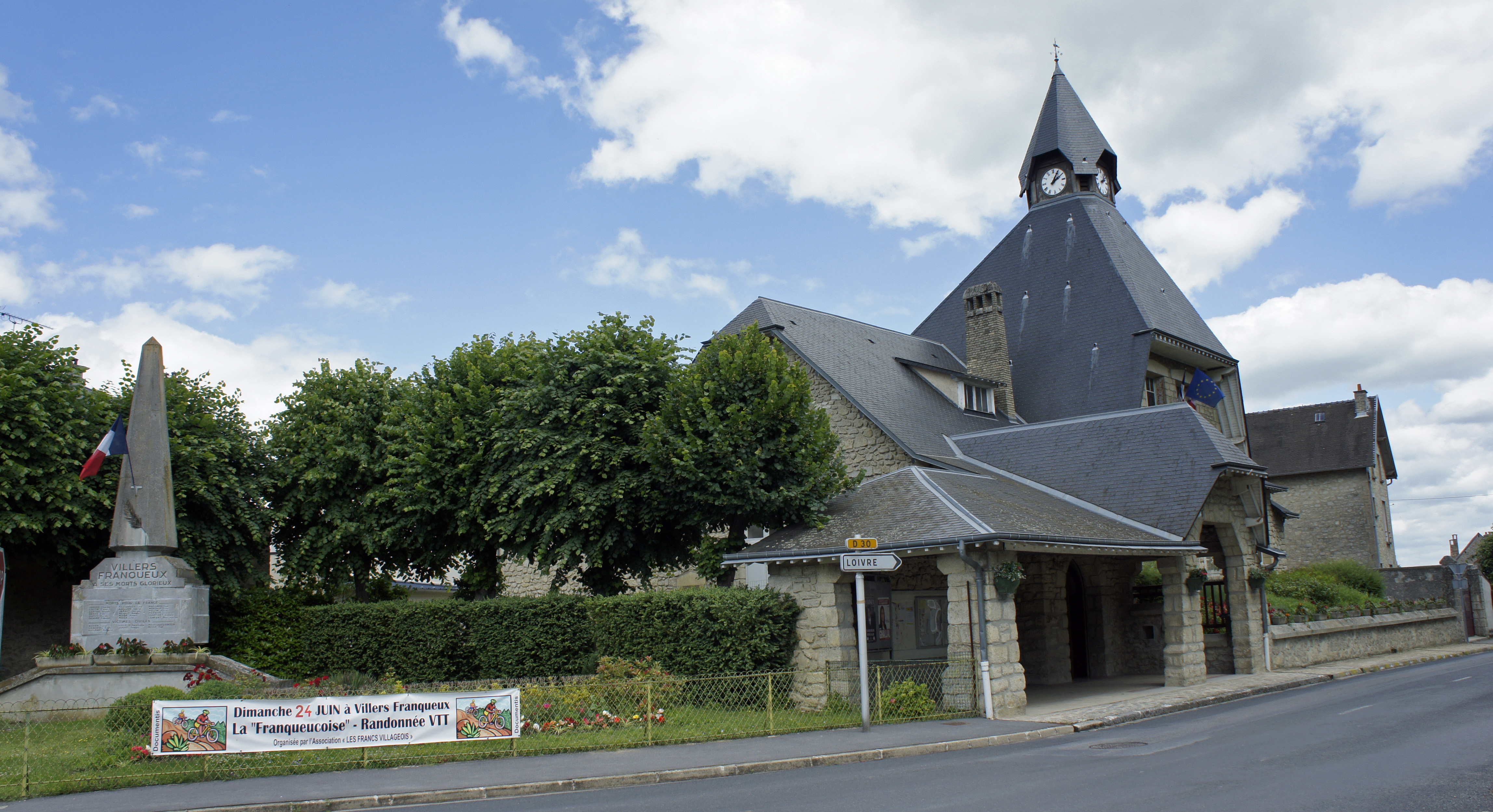 Mairie et monument aux morts à Villers-Franqueux.